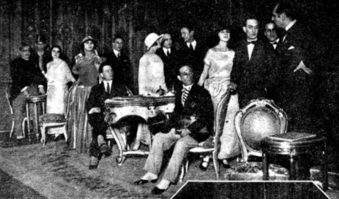 Photo of a Dramatic company after a representation (Foto 'post scenam' dalla rivista drammaturgica "Comoedia"), "Comoedia", n. V, p. 12, Mondadori, Milano, 1 marzo del 1923